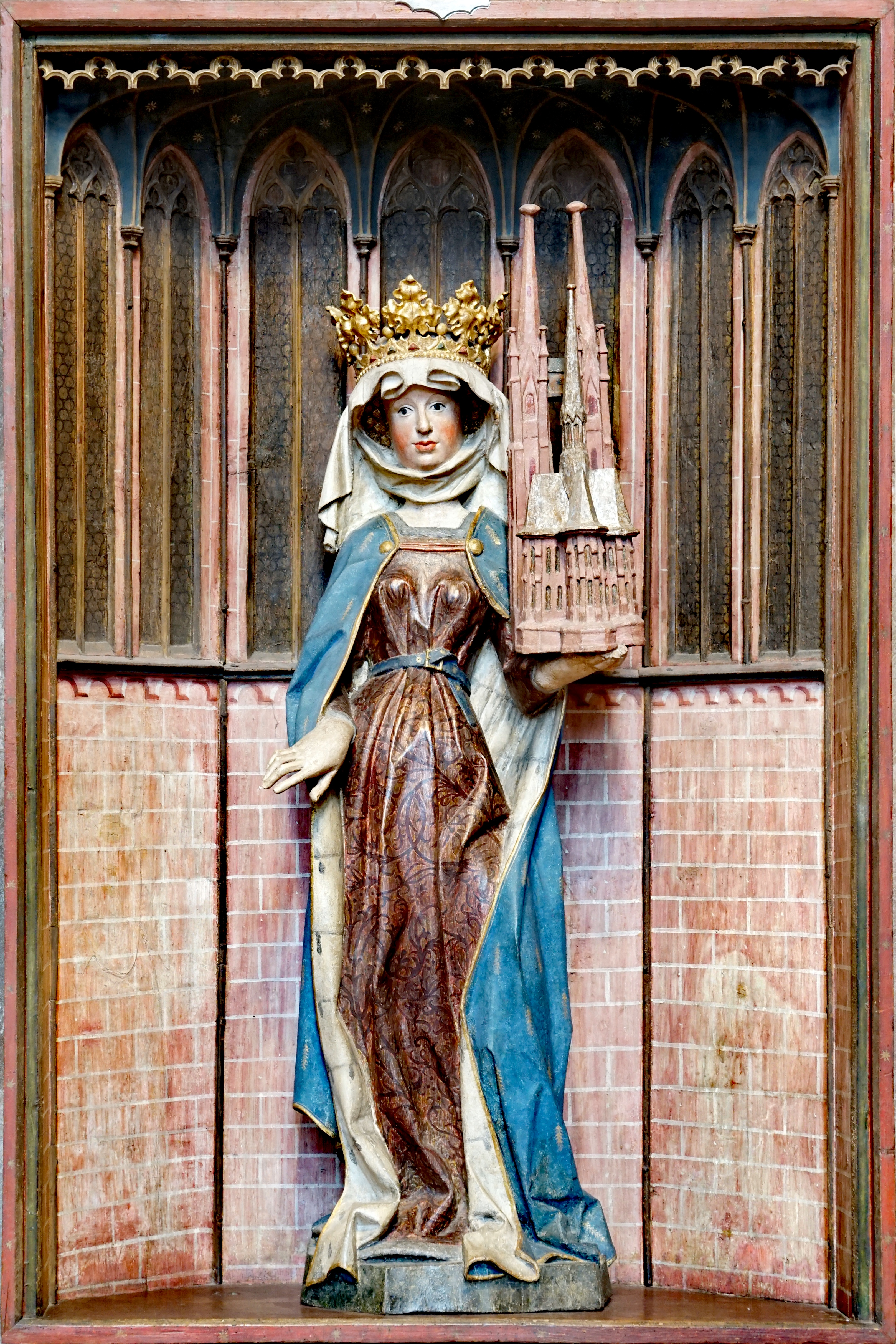 Siehe Dateiname